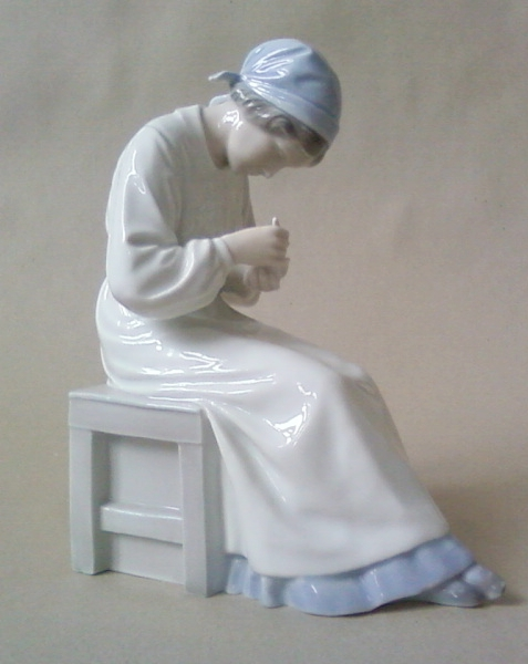 Dänische Porzellanfigur, Jugendstil, 20er Jahre; Foto von mir